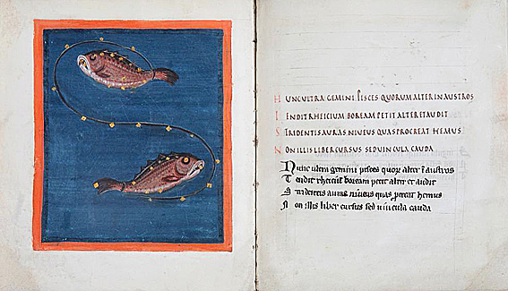 De Leidse Aratea. Universiteitsbibliotheek van Leiden. Perkament, 95 folio's (incompleet), 225 x 220 mm.